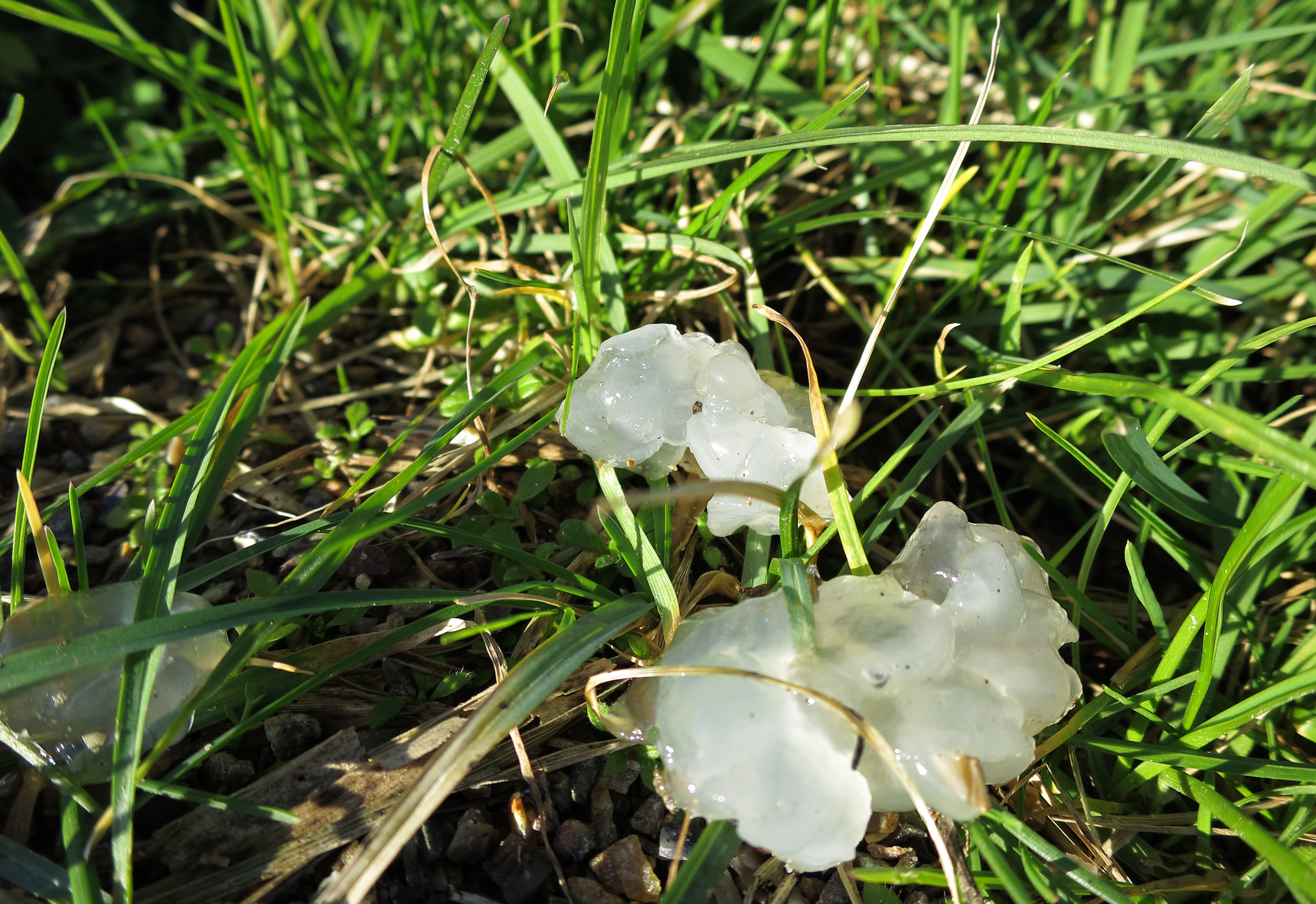 Små geleklumper i græsset. En rovfugl eller et rovdyr har gylpet æggelederen op igen efter at have spist en hunfrø. Kaldes stjernesnot.